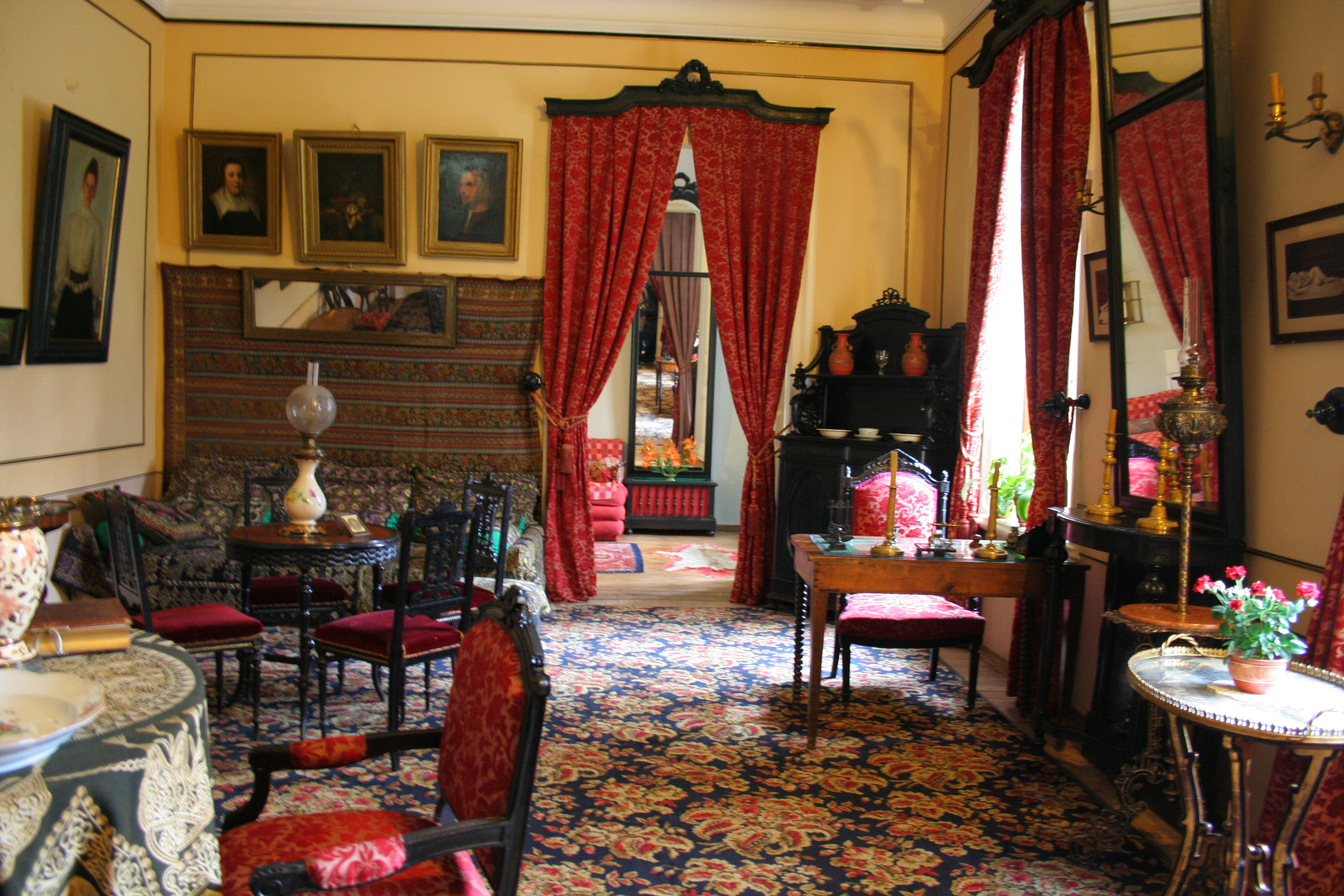 Мемориальный музей-усадьба Л. Н. Толстого «Хамовники». Внутренние виды.